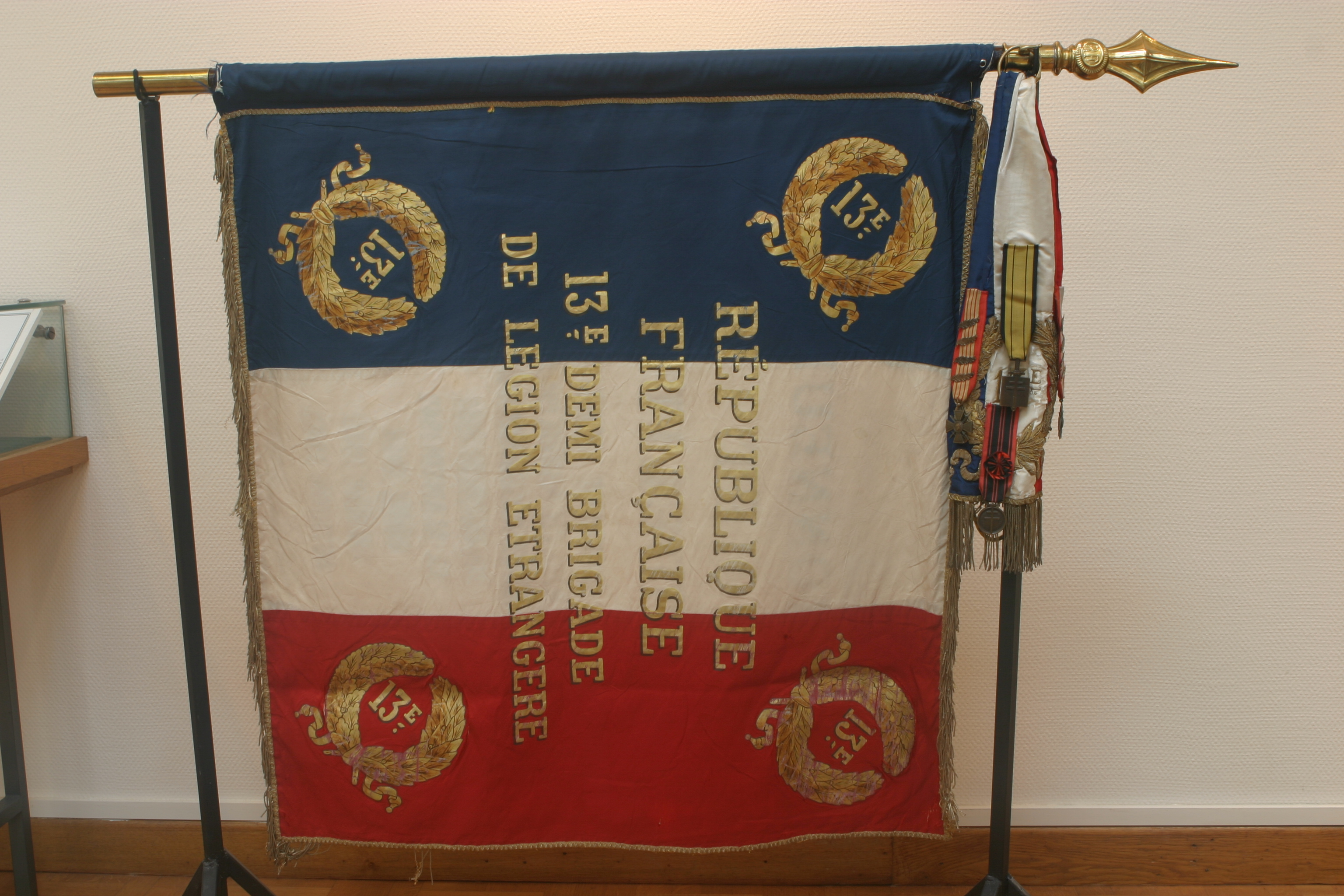 drapeau de la 13e Demi-brigade de Légion étrangère